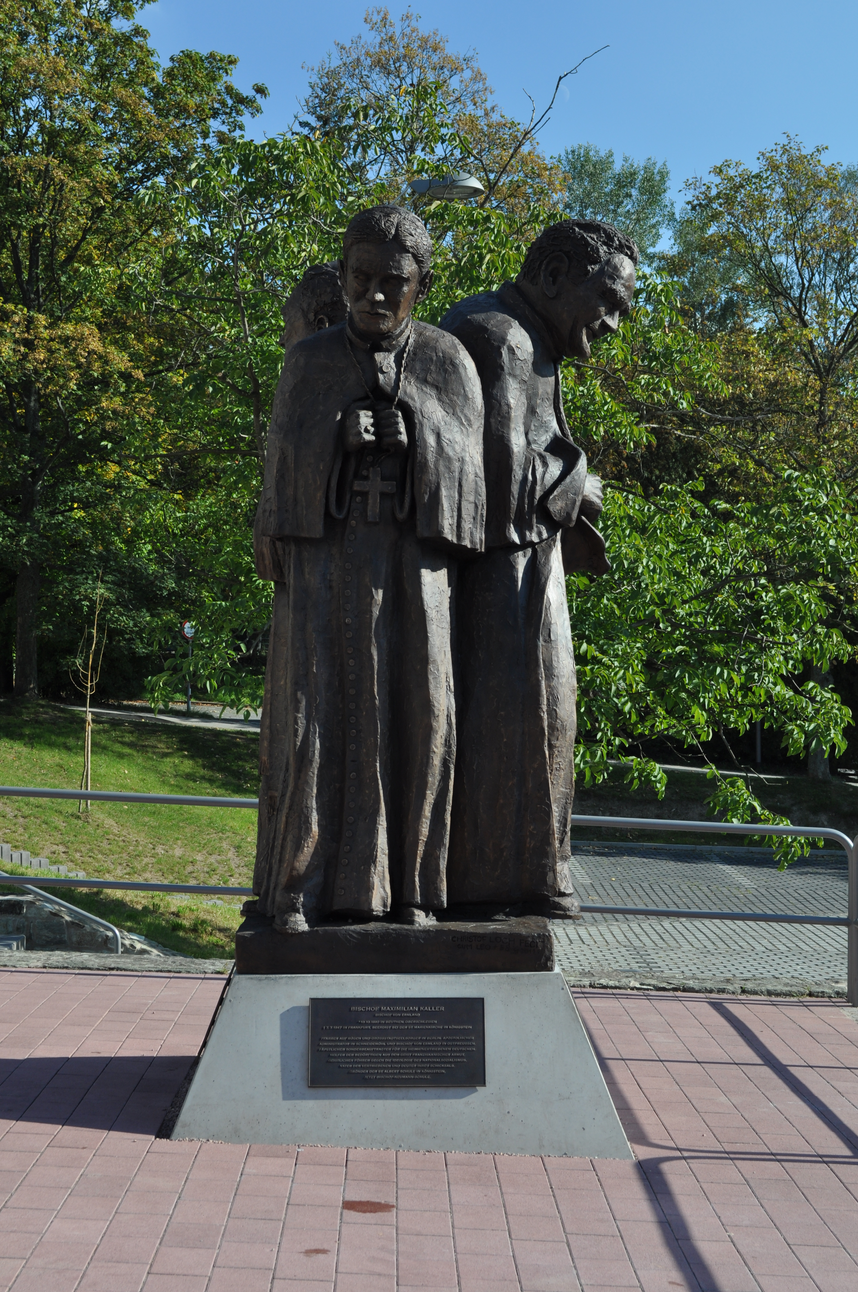 Denkmal für die Königsteiner Kirchenväter in Königstein im Taunus. Das Denkmal wurde von Christoph Loch entworfen und am 1. September 2011 eingeweiht. Das Bild zeigt die Figur von Maximilian Kaller